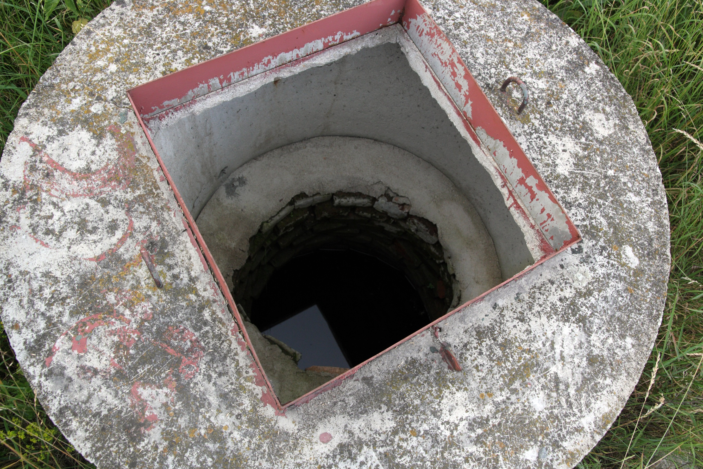 Vnitřek nepoužívané studny.